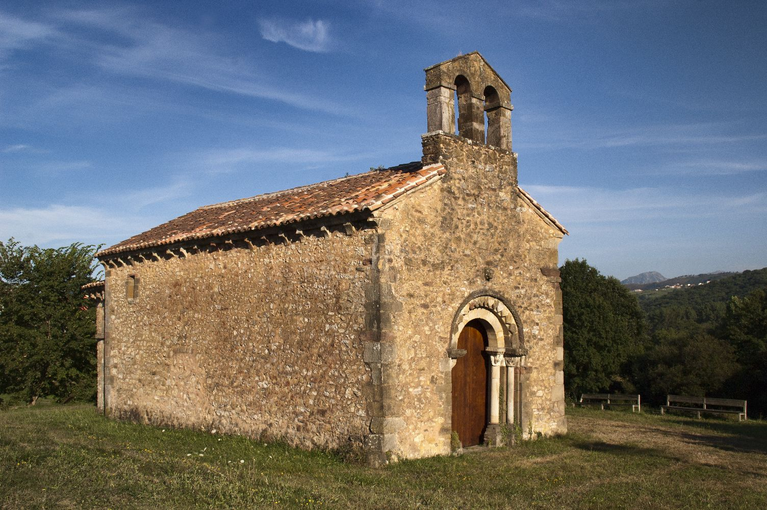 Románica, se menciona por primera vez en un documento de 1240; es de planta rectangular y una sola nave con ábside semicircular- Su orientación es Oeste (puerta principal) Este (ábside).